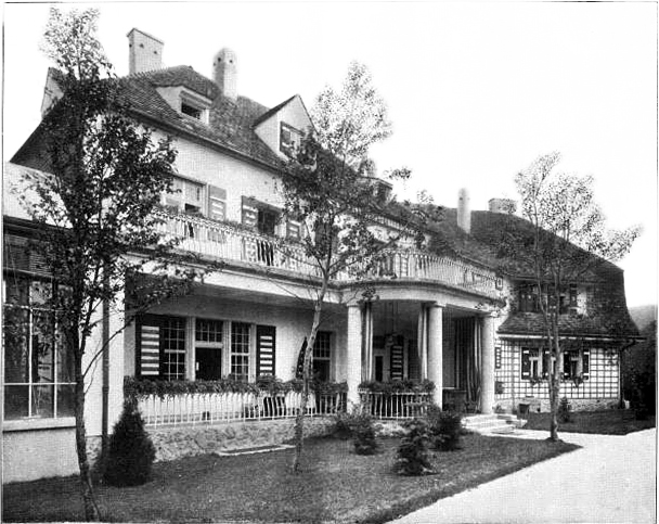 Gaaden, Niederösterreich, Jagdschloss Karl von Skoda (erbaut von Emanuel von Seidl)